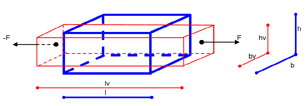 Ortangula specimeno je distiro.